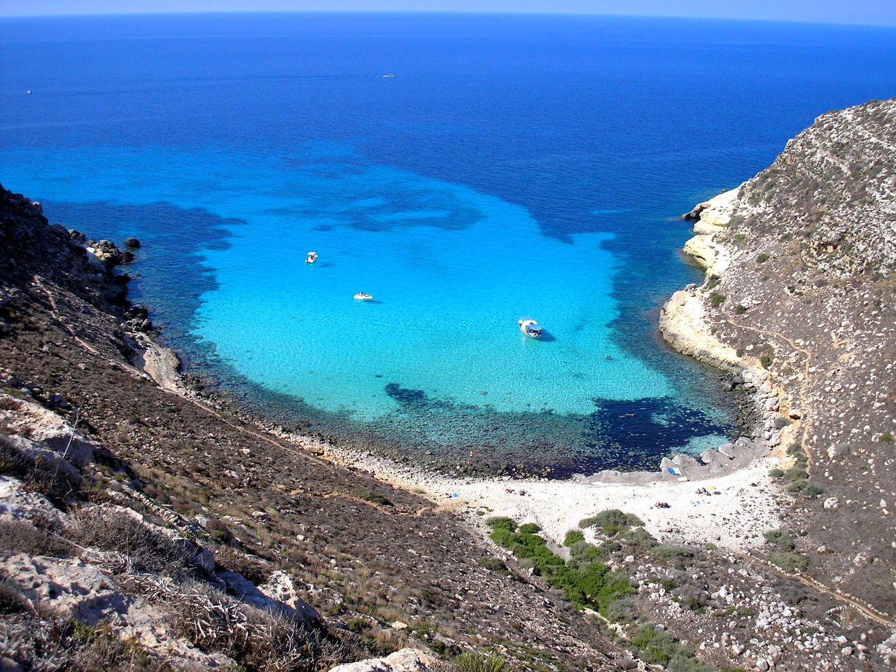 lampedusa_6